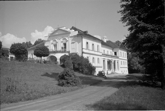 Palais de Nemyšl